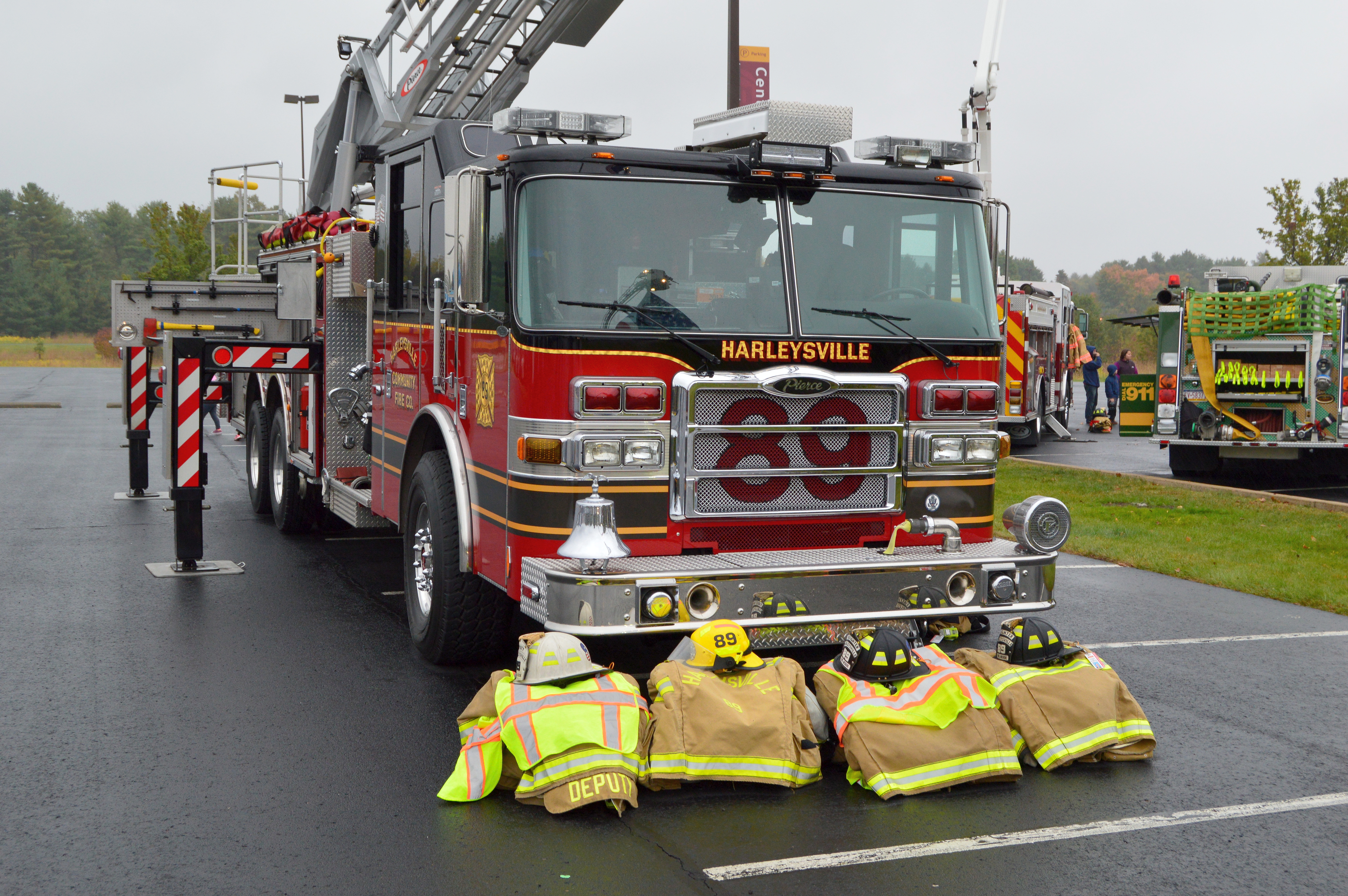 Fire engine in Harleysville, Pennsylvania.